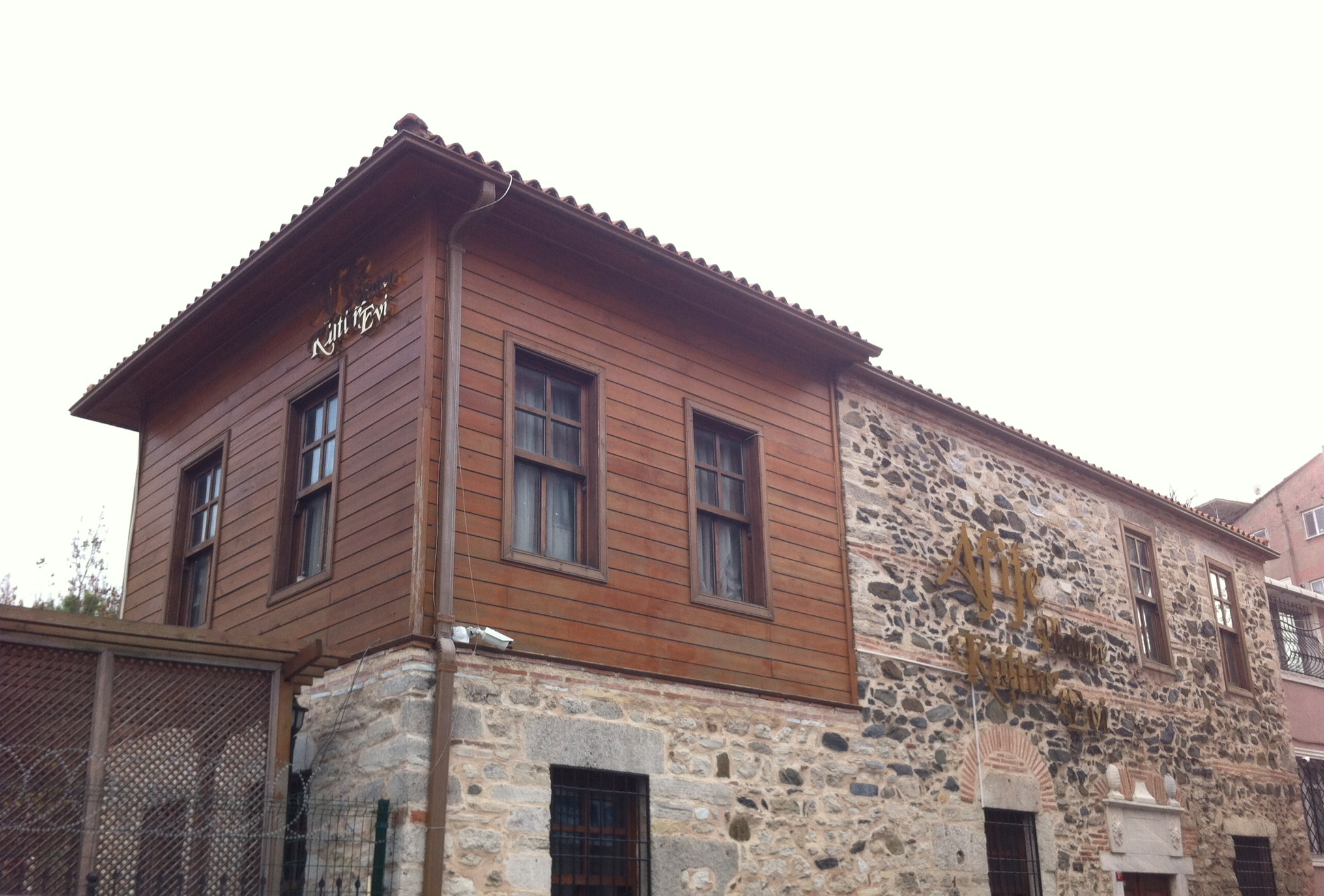 Afife Hatun Tekkesi-Eyüp